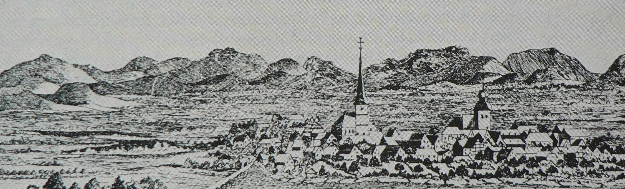 Melle um 1700, Kupferstich